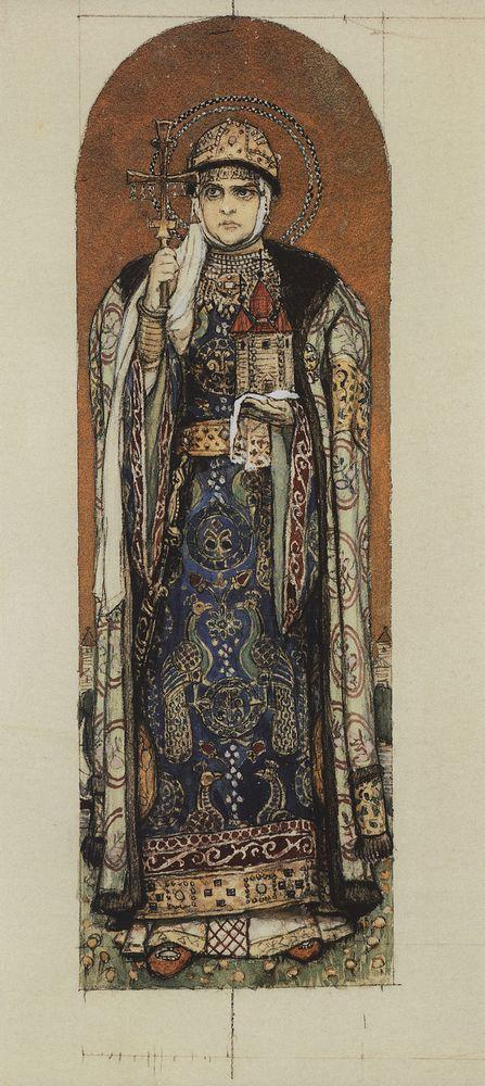 Княгиня Ольга. 1885-1893 Эскизы росписи Владимирского собора в Киеве Государственная Третьяковская галерея, Москва